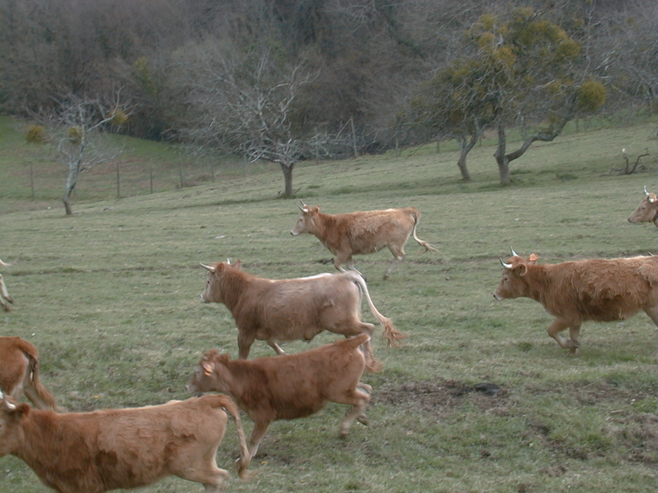 Betizuen taldea korrika